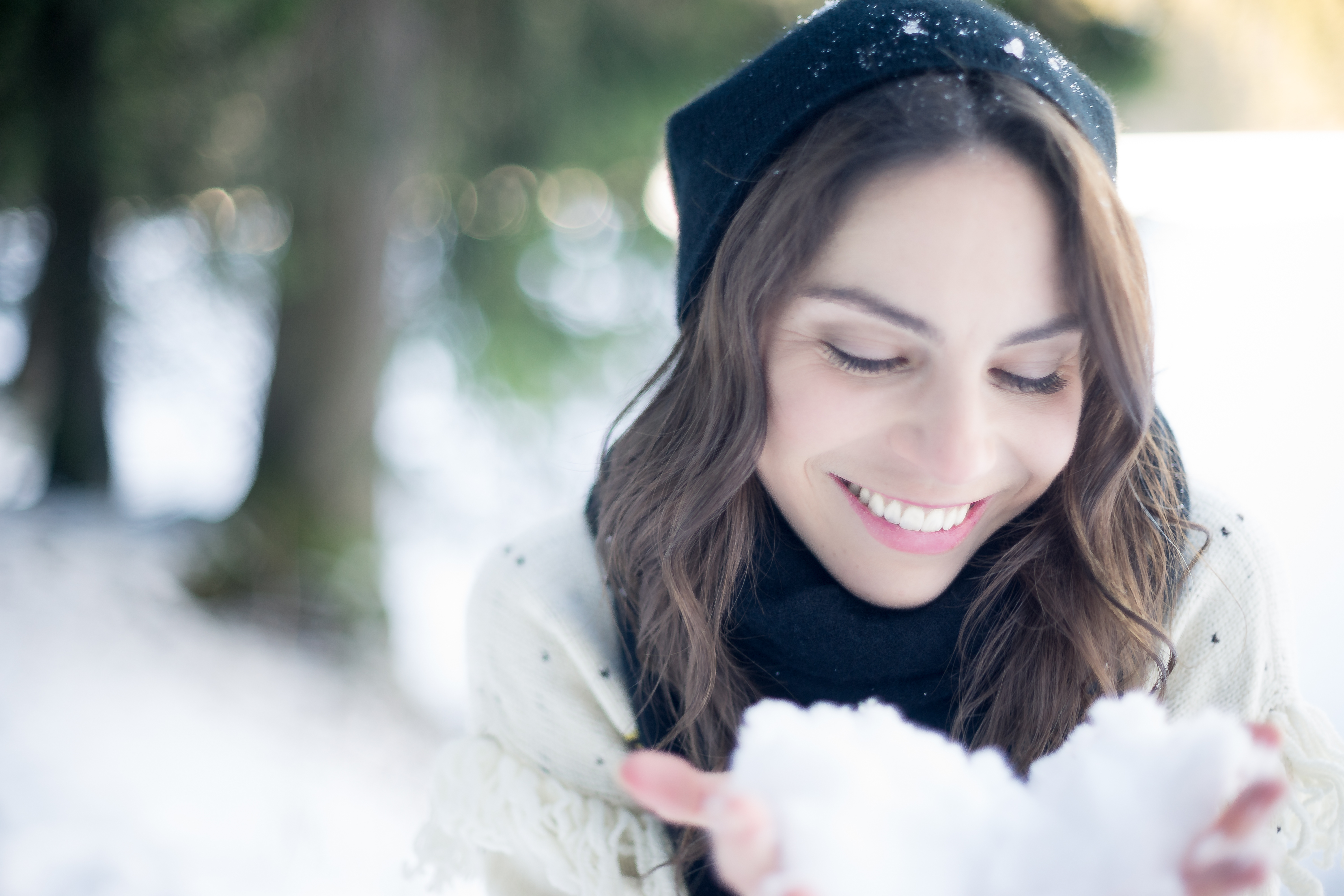 Hanna-Elisabeth Müller bei einem Spaziergang am Spitzingsee. Sie hält Schnee in ihren Händen.